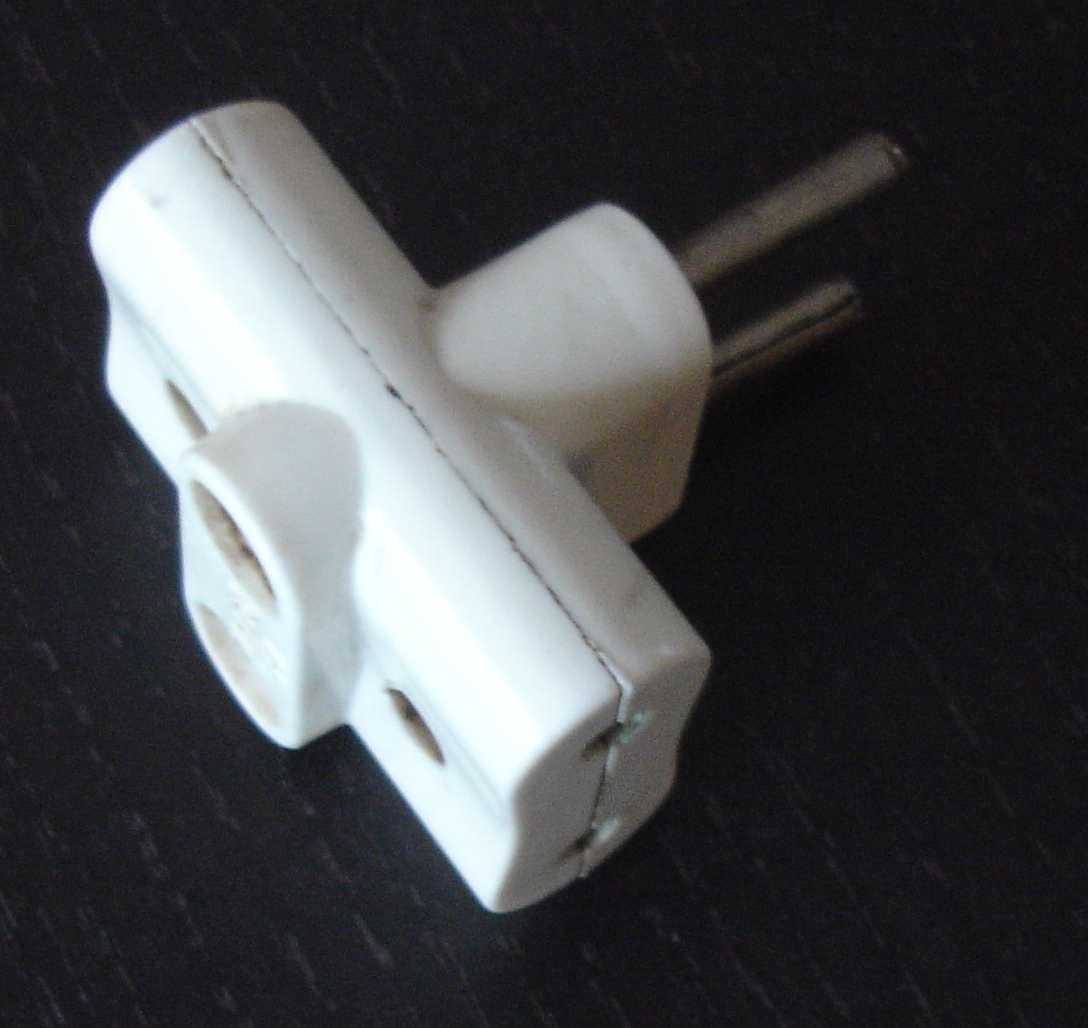 Old fashioned multiple socket